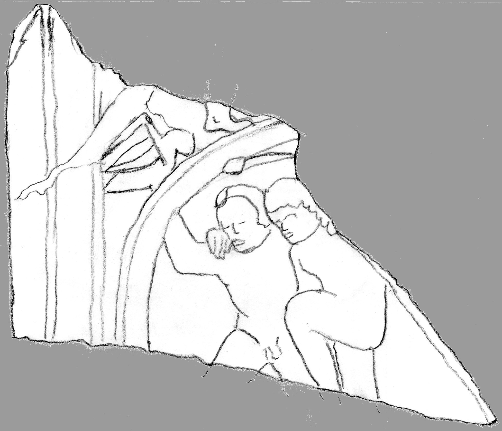 Odéon antique de Lyon. Dessin d'un fragment de décoration en marbre, provenant probablement du pulpitum de l'odéon. Sous un rinceau, deux personnages nus foulent aux pieds (du raisin?). Au-dessus du rinceau, un criquet et un pied nu. Fragment n°1 conservé au musée gallo-romain de Fourvière, dimensions 21cm x 36 cm x 12,5 cm; inventaire n° 2001-0-303 [1-16]